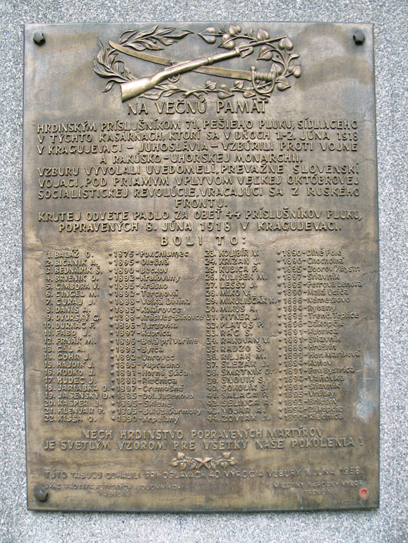 Pamätná tabuľa na pamätníku kragujevským martýrom